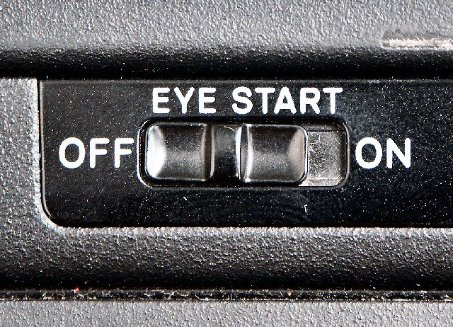 Minolta Dynax 9 - Eye-Start-Schalter (Fotografiert mit: Minolta Dimage 7 Hi)